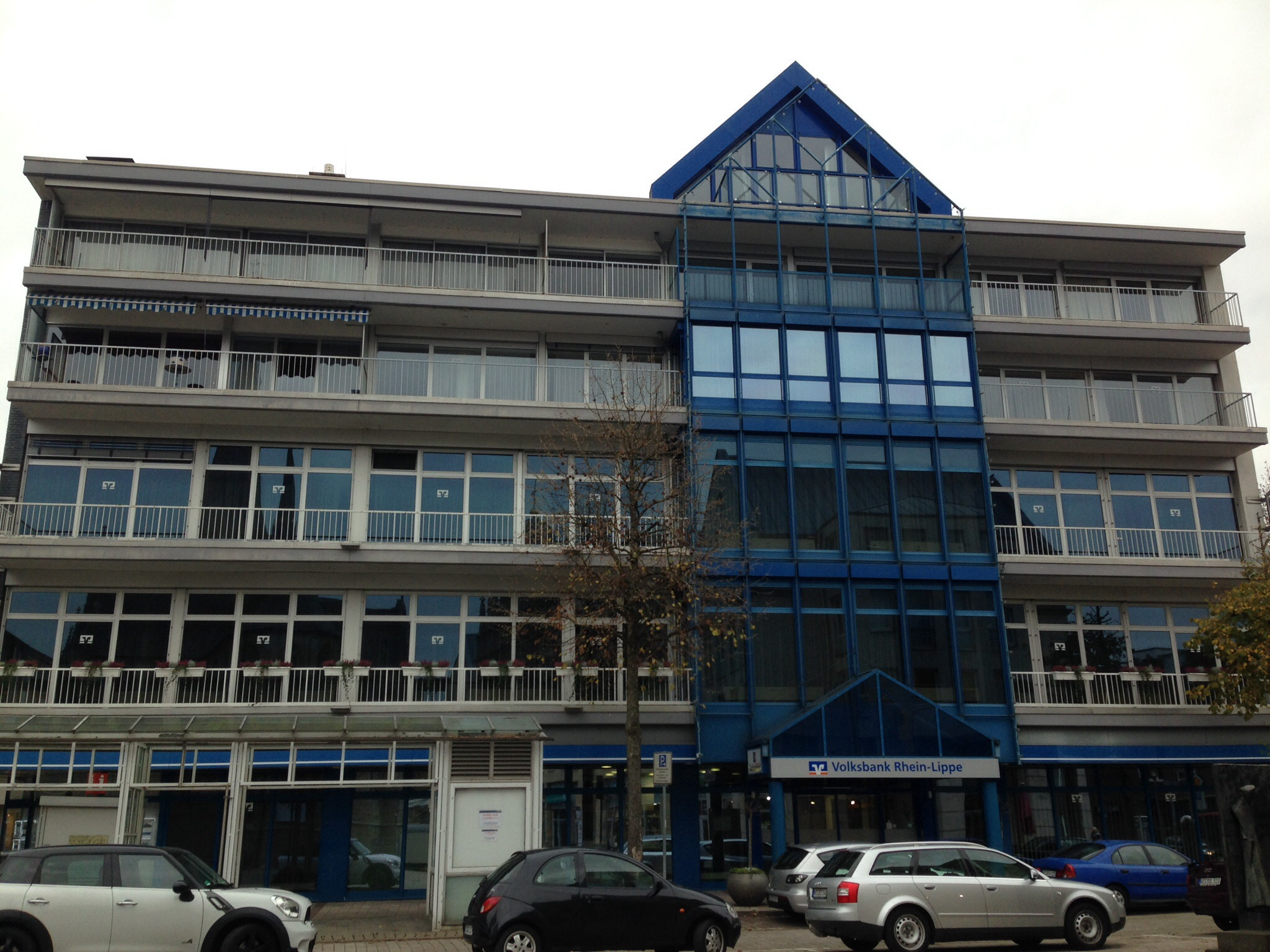 Volksbank Rhein-Lippe am Weseler Domplatz